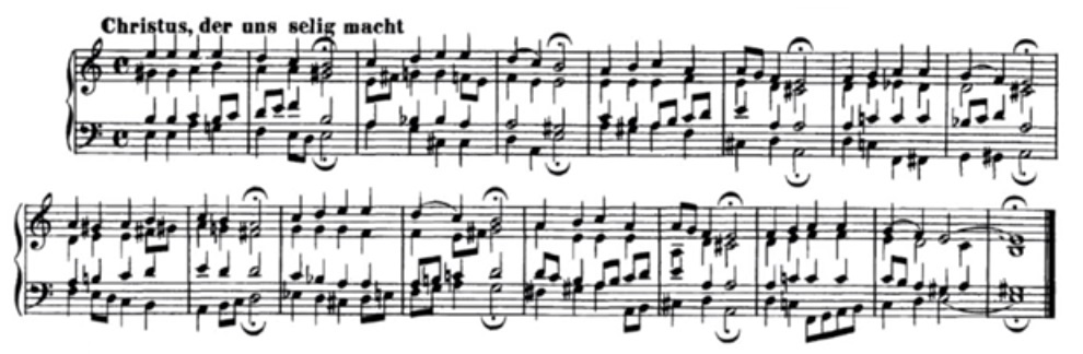 Johann Sebastian Bach, Johannespassion, Choralsatz Christus der uns selig macht (BWV 245.15)